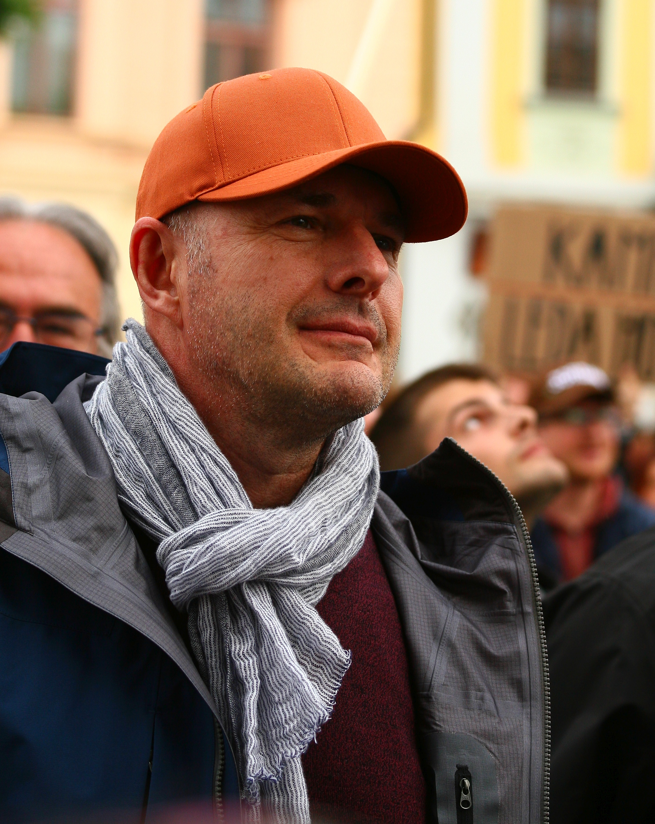 Josef Bernard na demonstraci Milion chvilek pro demokracii v Plzni 28. května 2019.